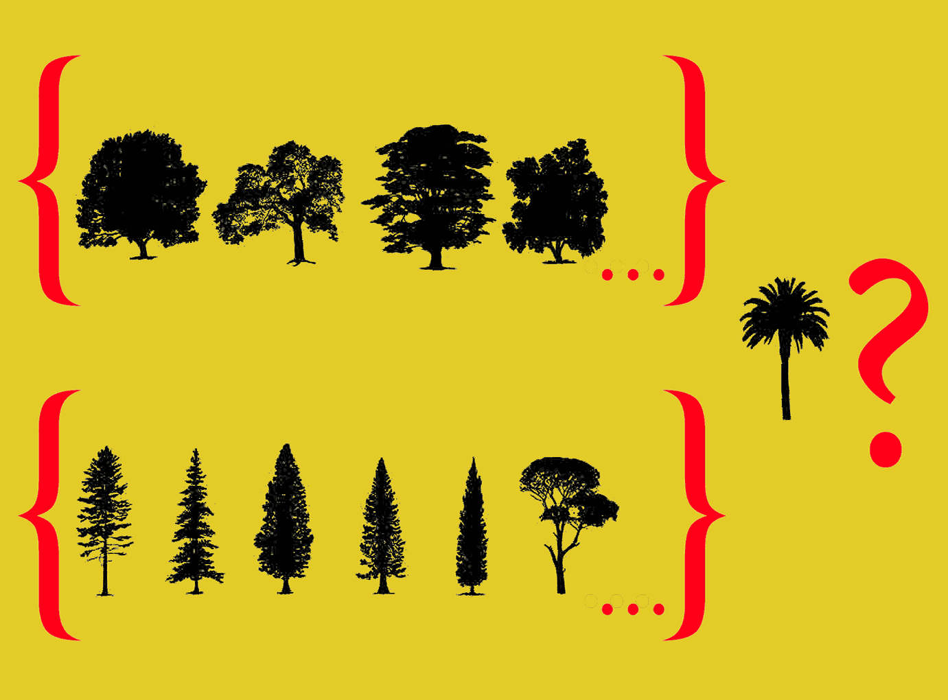 Grafische Veranschaulichung zur kognitiven Bildung von Kategorien und Oberbegriffen